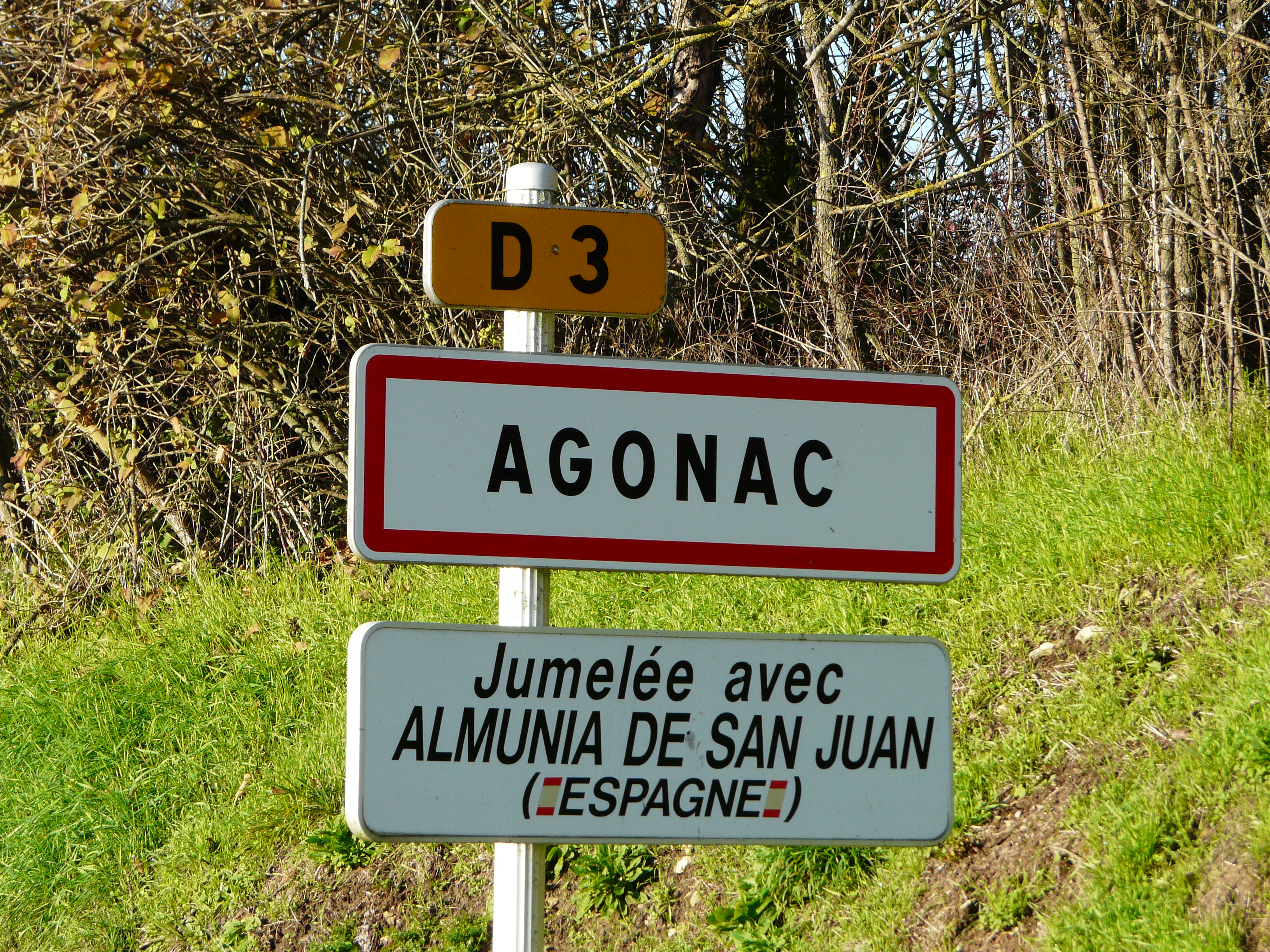 Panneau de jumelage d'Agonac, Dordogne, France.